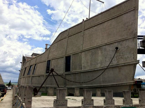 La barca de la Fe, Tlaxco